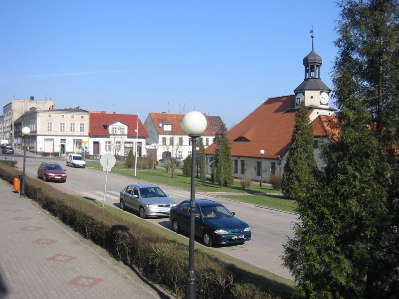 Rynek w Zdunach